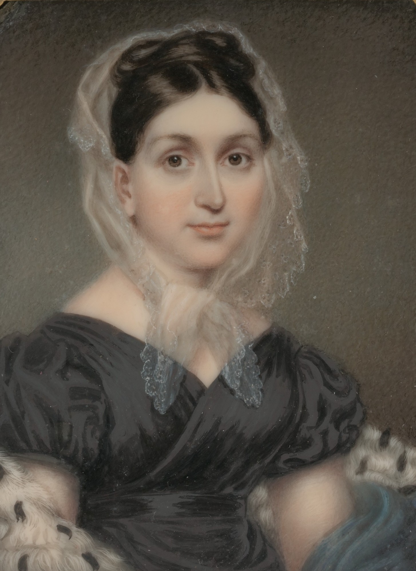 Painting, miniature; Paintings